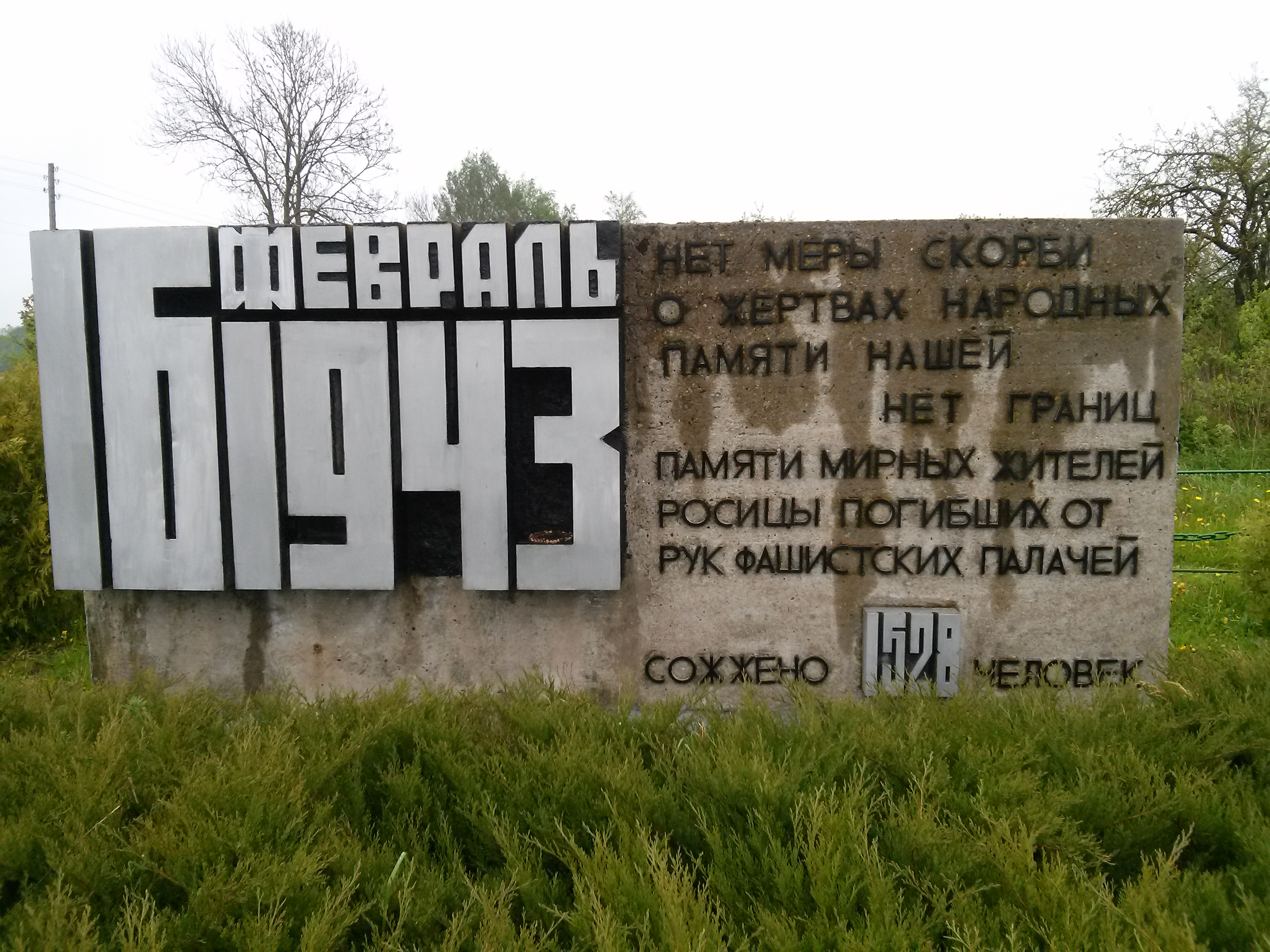 Помнік ахвярам нацыстаў у Росіцы.